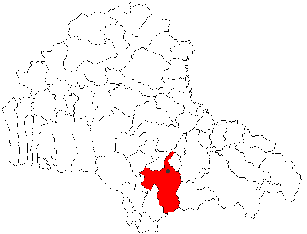 Categorie:Hărţi ale judeţului Braşov